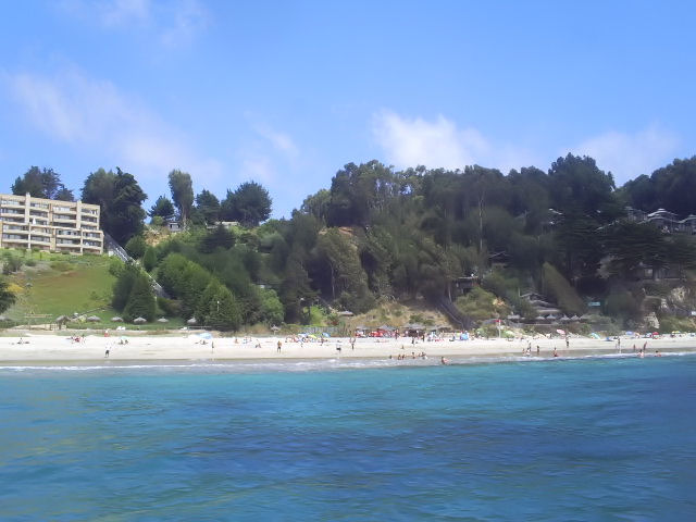 cau cau